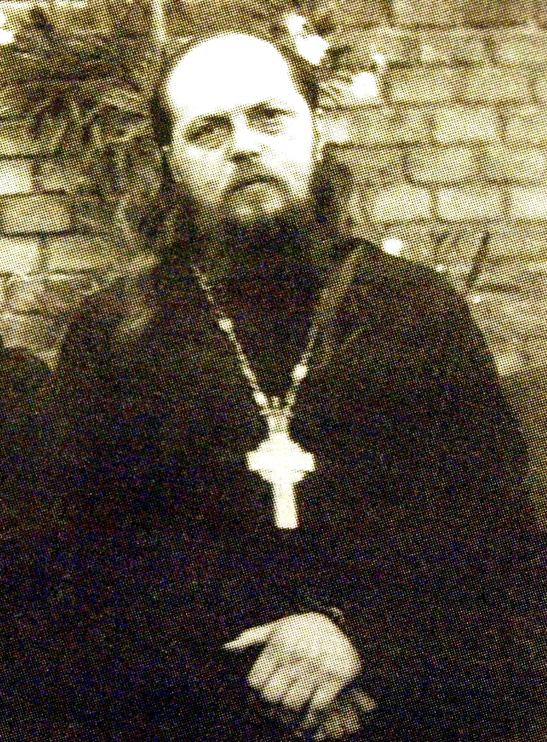 Archimandrita Isaakij